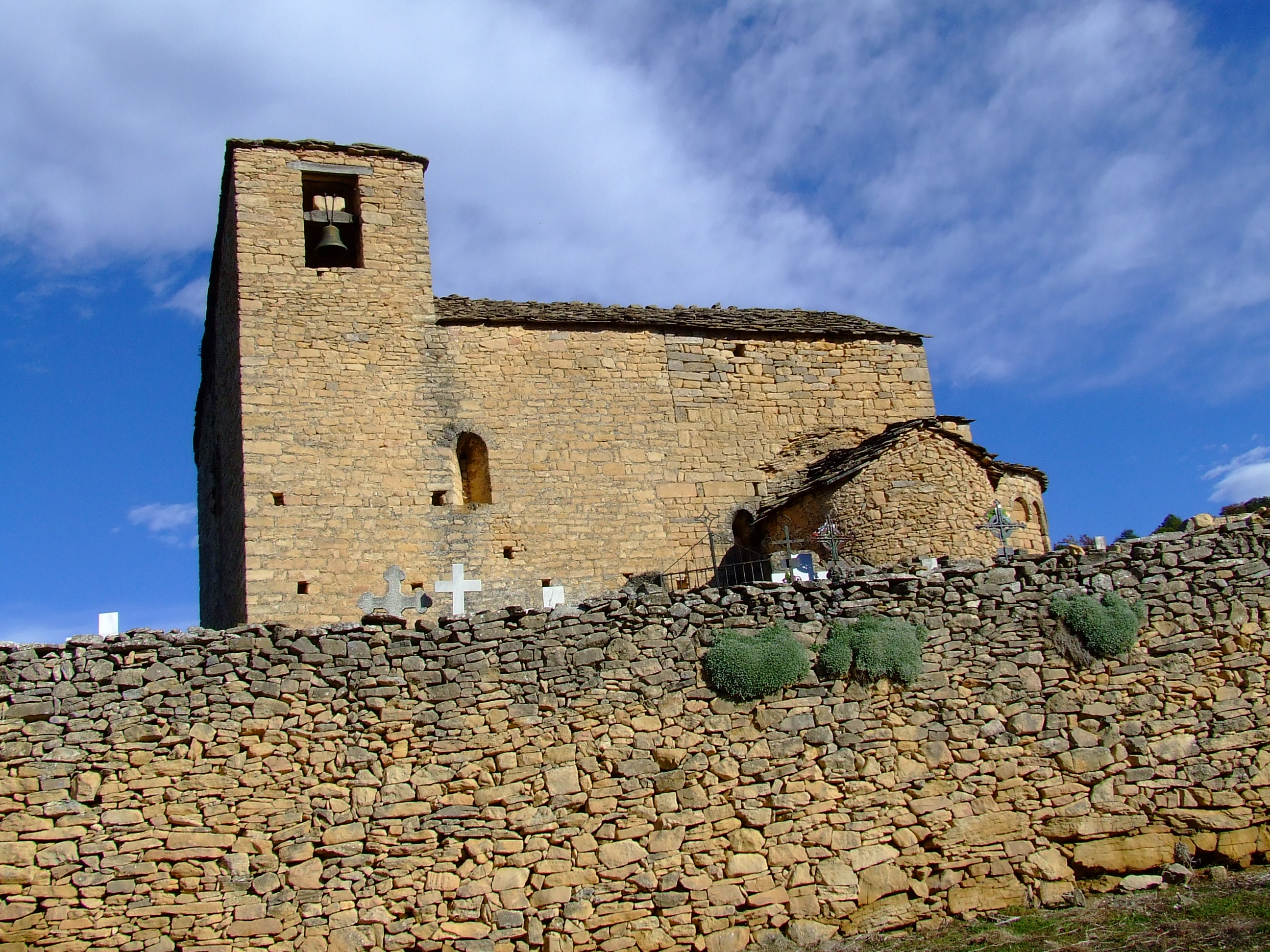 Sant Andreu de Biscarri, façana meridional (Biscarri, Benavent de la Conca, Isona i Conca Dellà, Pallars Jussà)